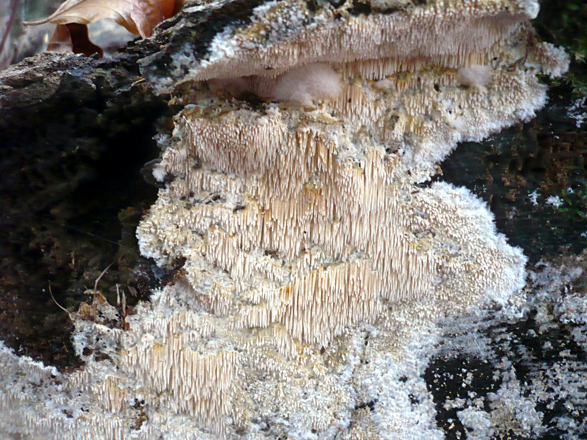 Dentipellis fragilis (Pers.) Donk